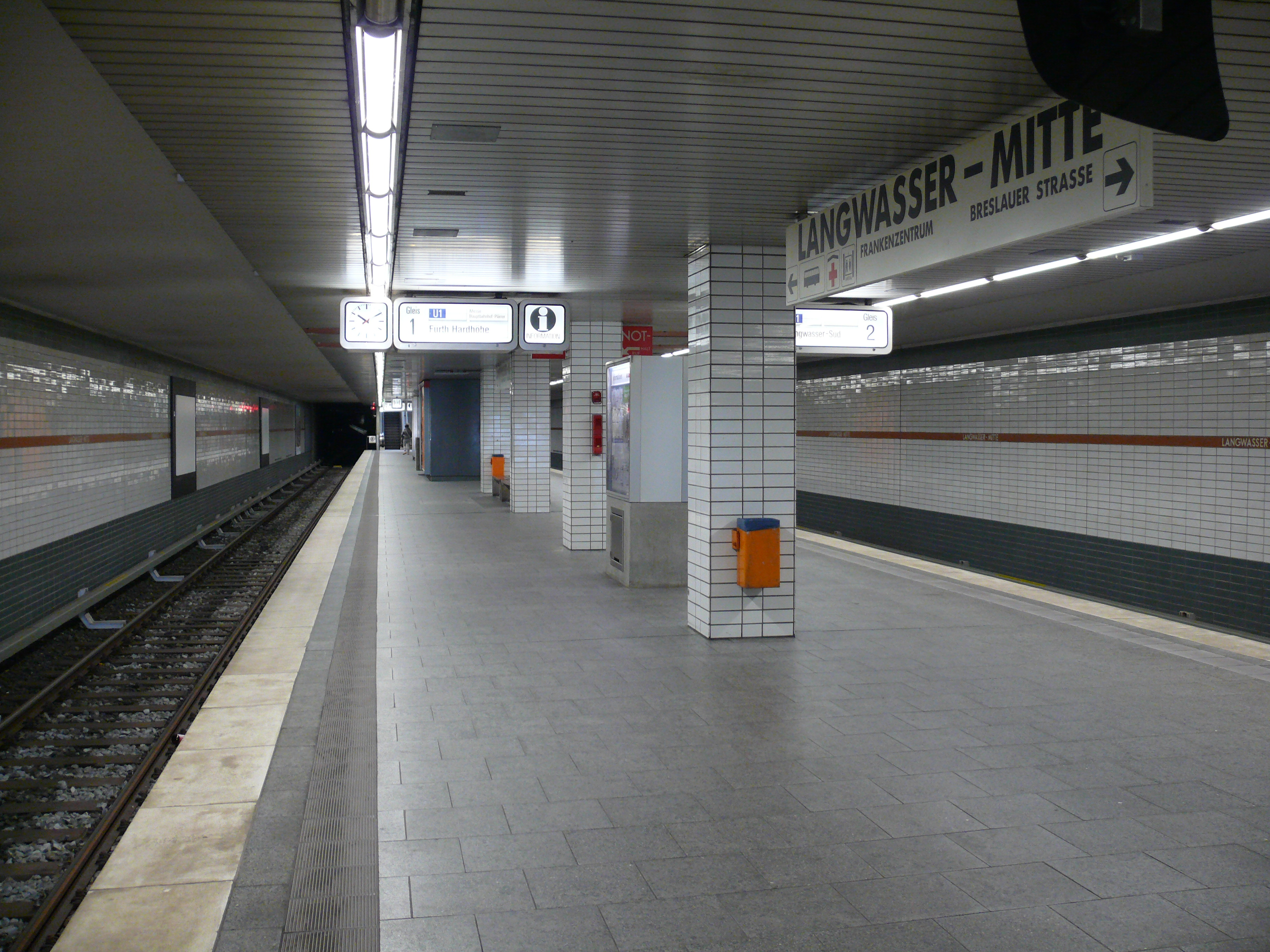 Bahnsteigebene am U-Bahnhof Langwasser Mitte in Nürnberg.